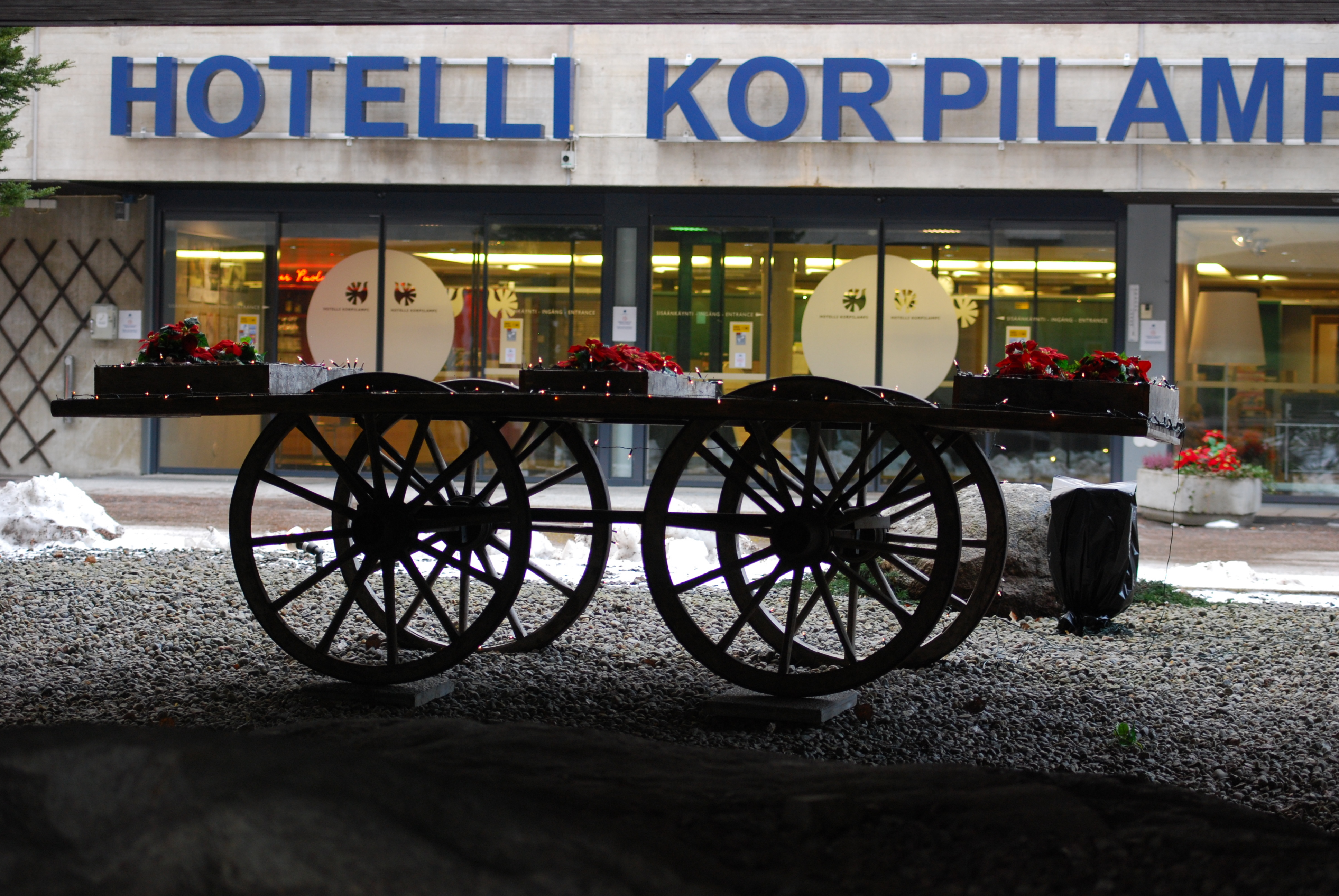 Отель Korpilampi